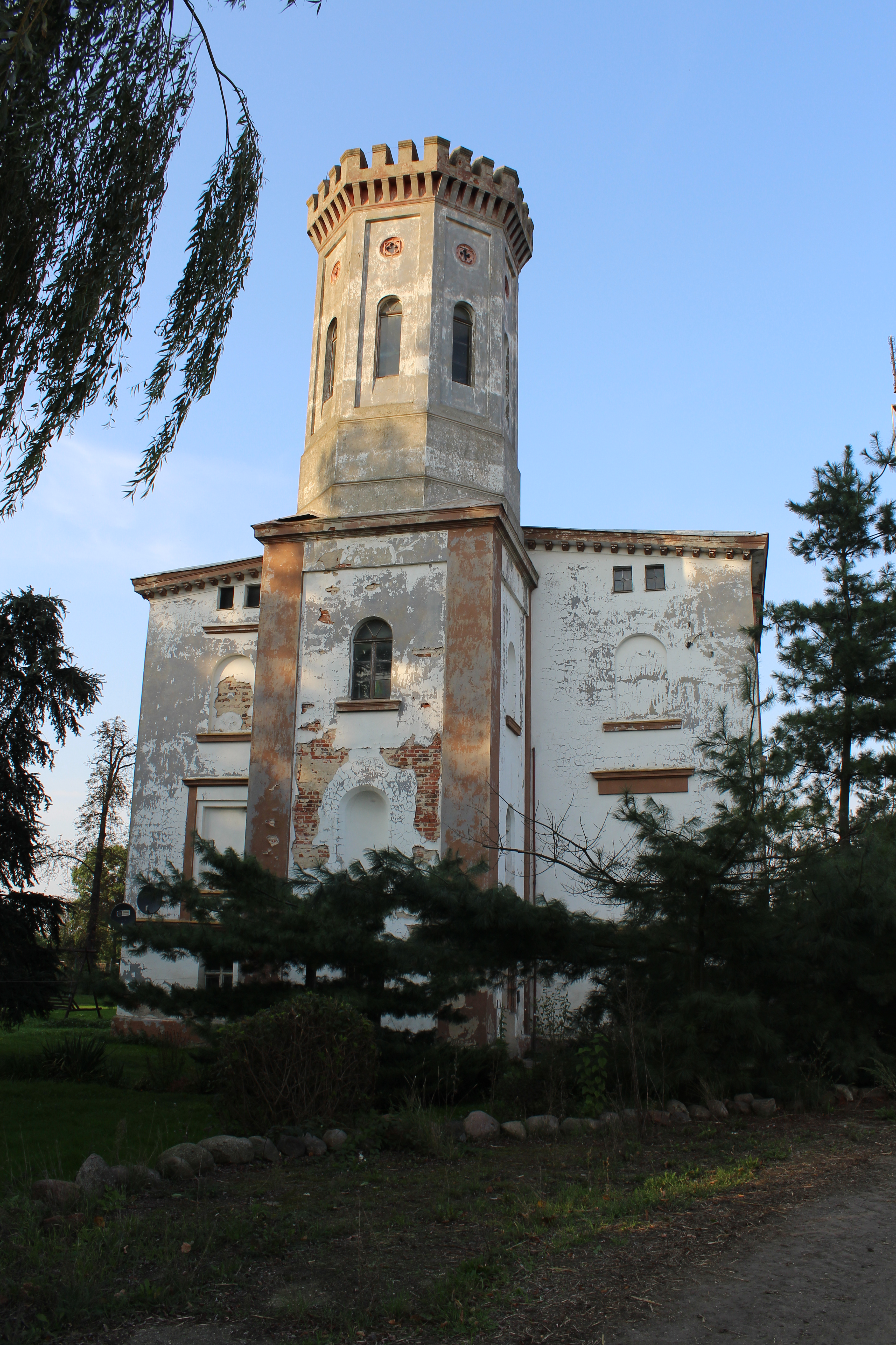 Białołęka, pałac